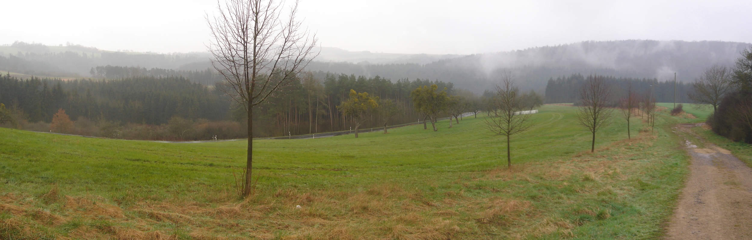 The Eifel around Speicher, B-50 between Bitburg and Spandahlem